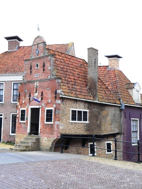 Het Zakkendragershuisje te Franeker